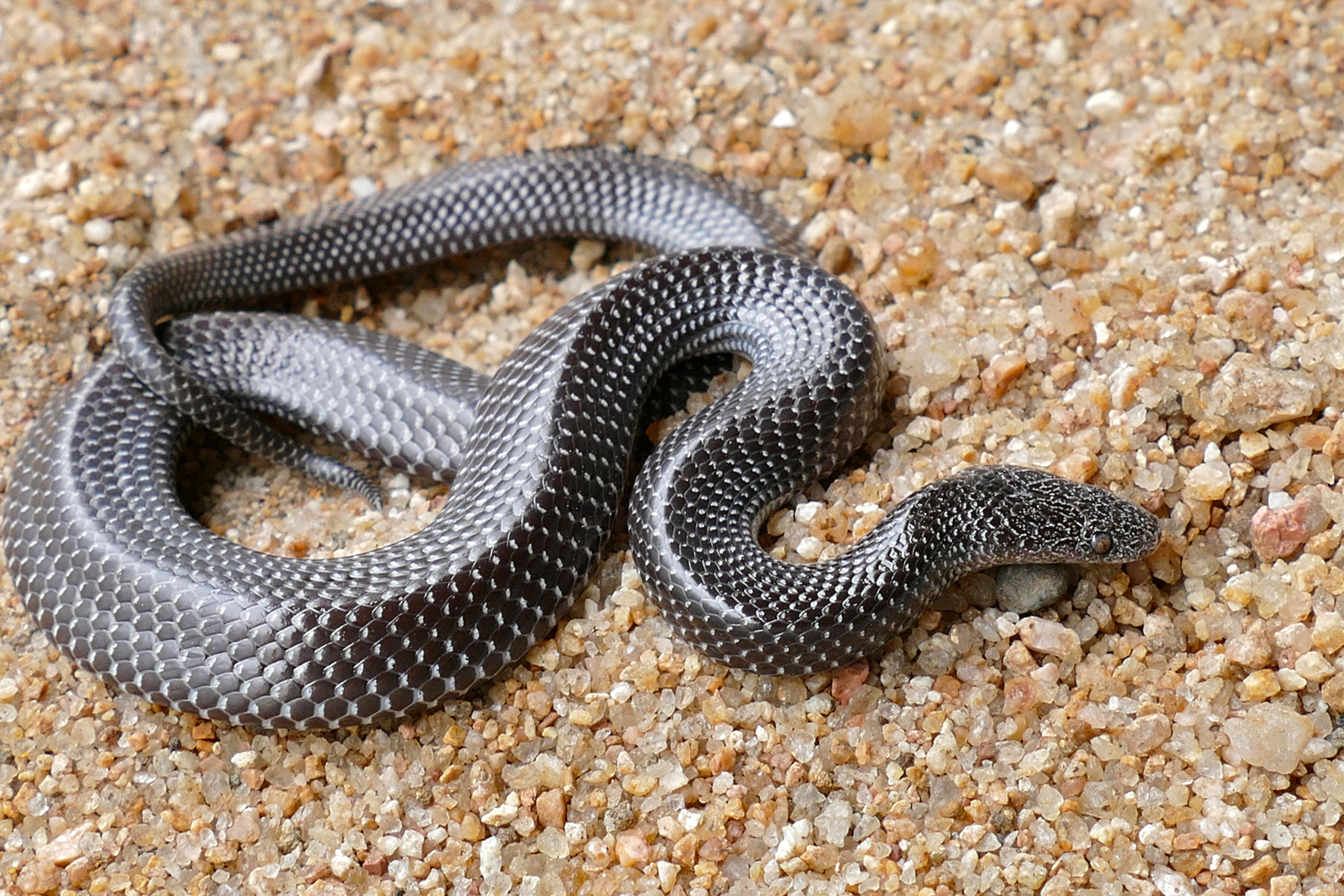 Lower Sabie Camp, Kruger NP, SOUTH AFRICA